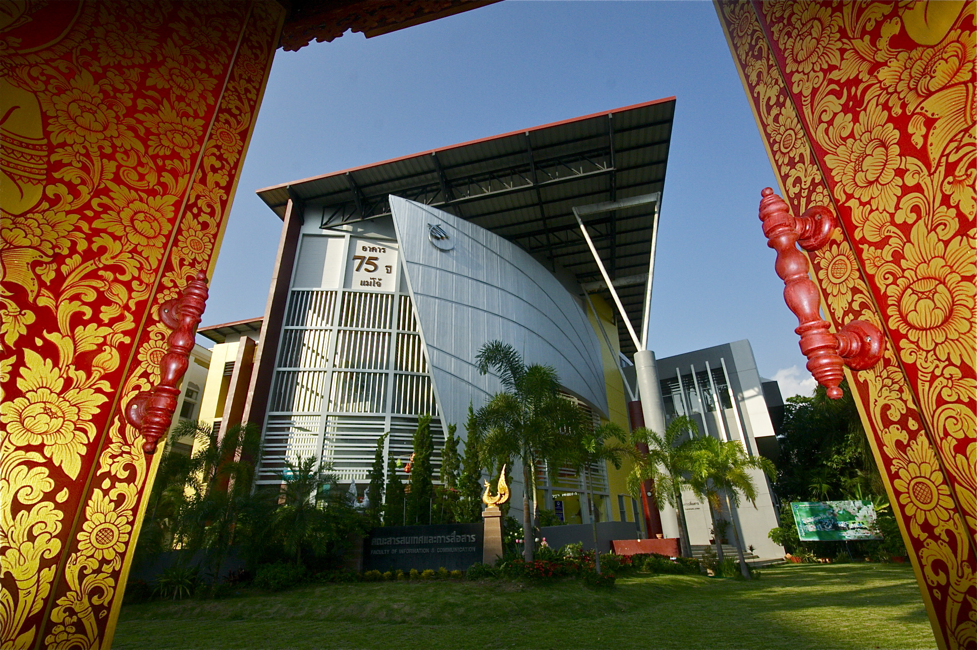 ตึกคณะสารสนเทศและการสื่อสาร หรือ ตึก 75 ปีคณะสารสนเทศและการสื่อสารสร้างขึ้นเมื่อมหาวิทยาลัยมีอายุครบ 75 ปี